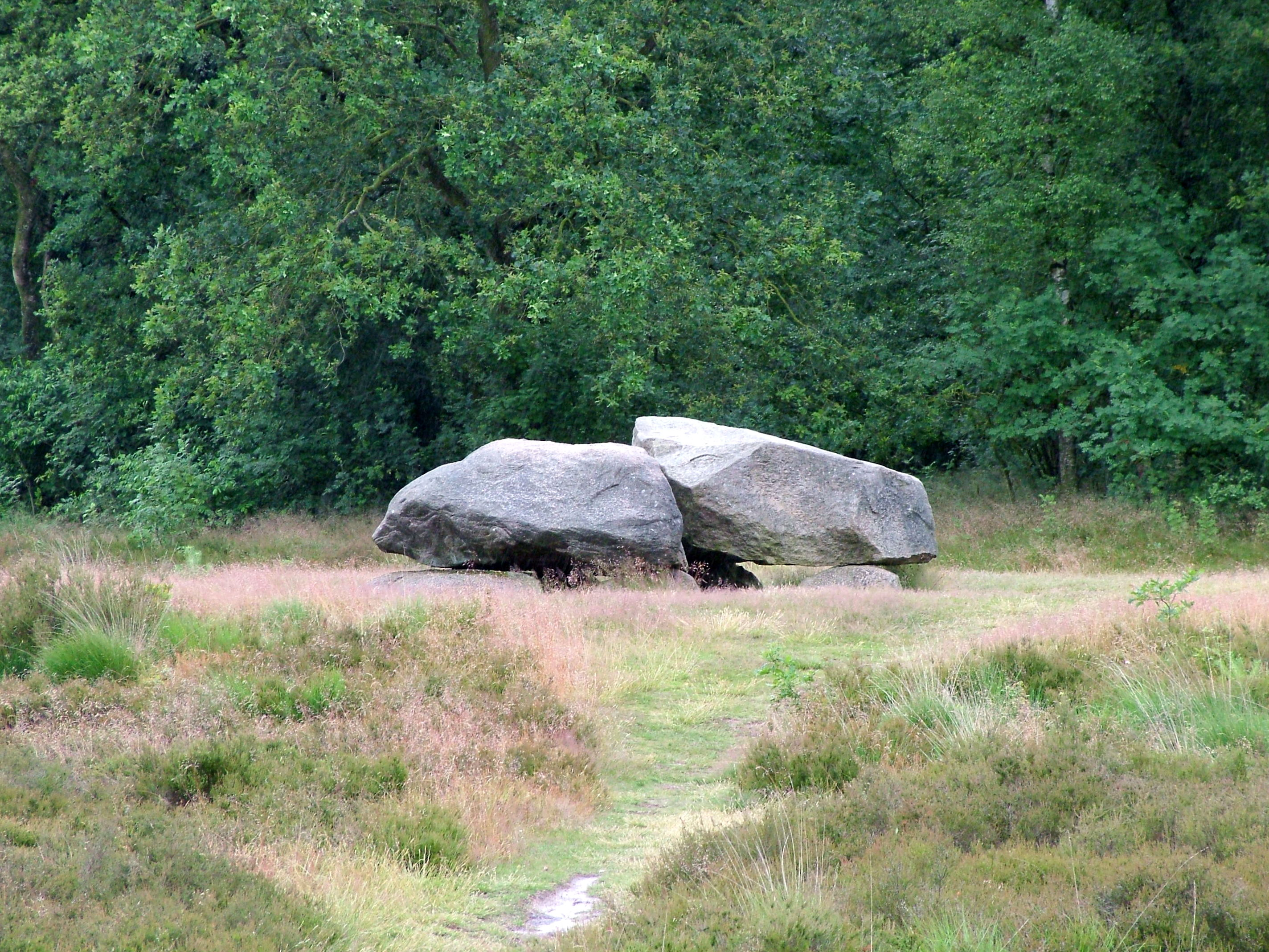 Hunebed bij Emmen